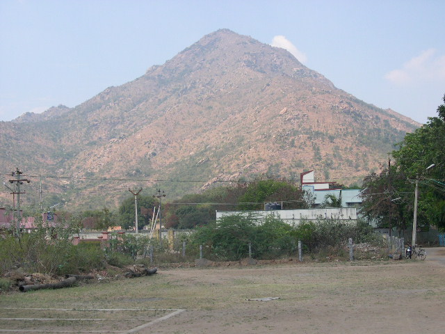 Arunachala Hill / Annamalai Hill